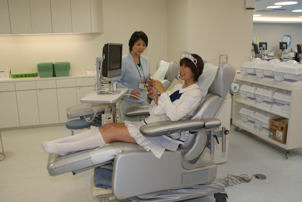 akiba:F Opening Event - 060